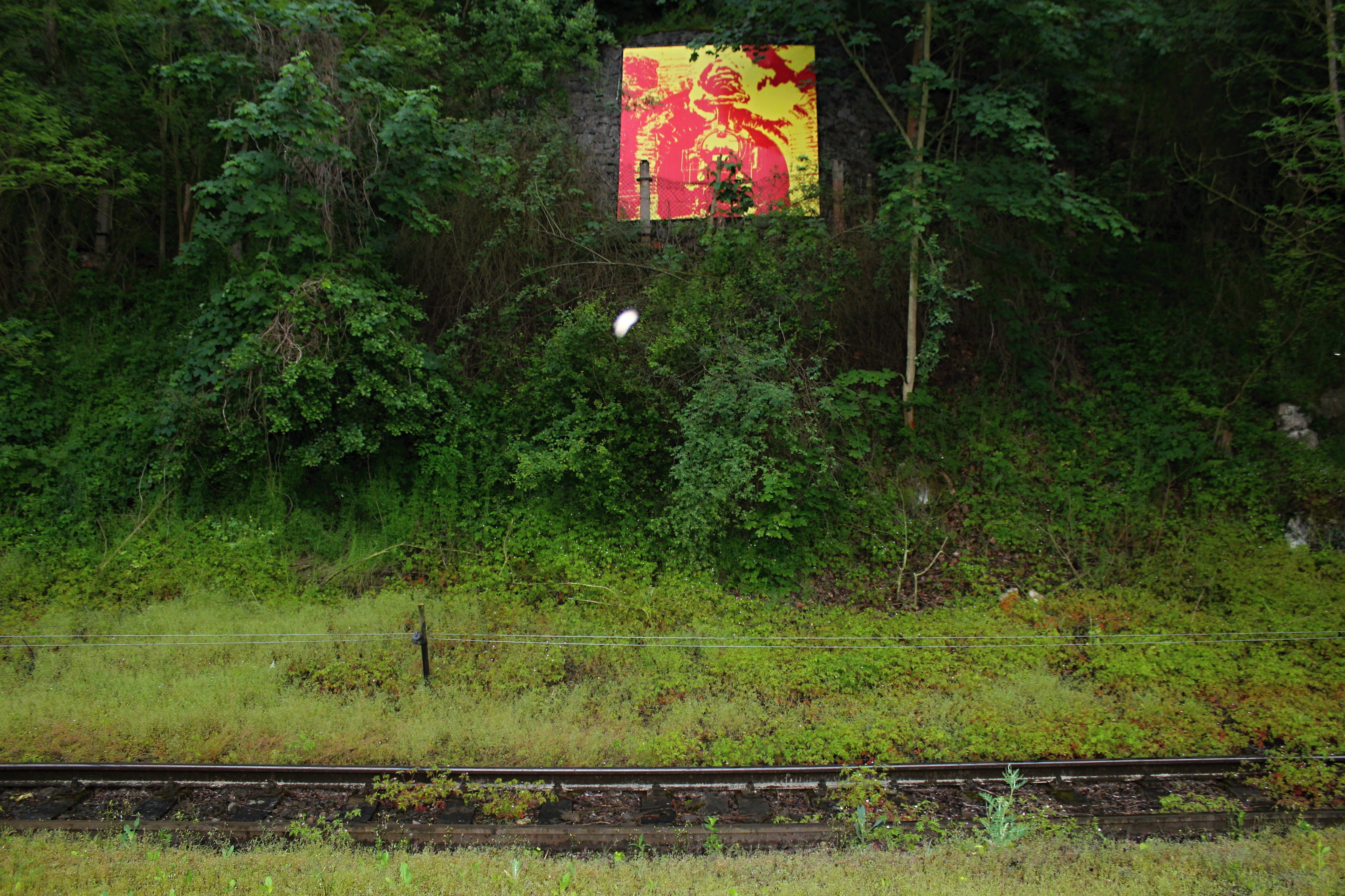 Davle - detail torzo tunelu z natáčení filmu Most u Remagenu